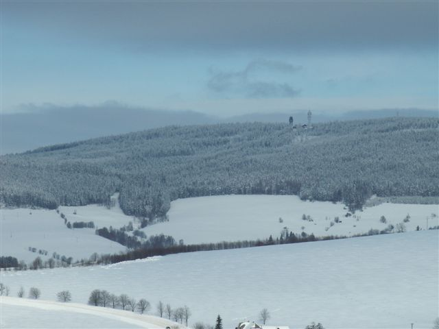 Suchý vrch v zimě